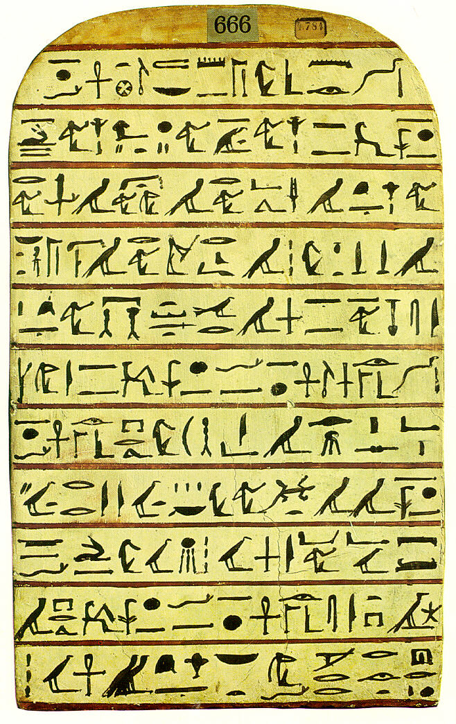 Imagem de escultura egípcia